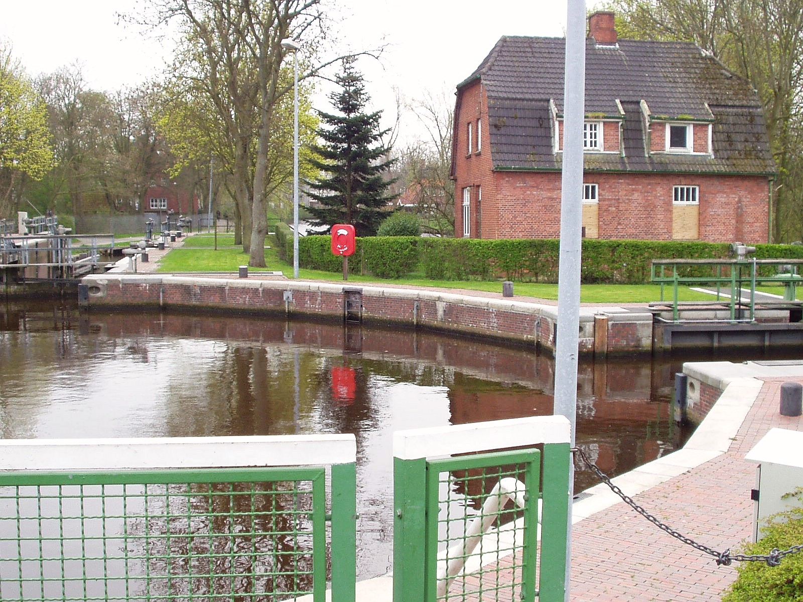 Ansicht der Kesselschleuse in Emden, Blick nach Süden